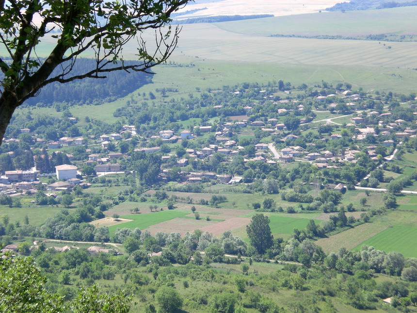 Общ изглед към село Априлово, община Попово - 2007 год. Поглед от Керчан баир